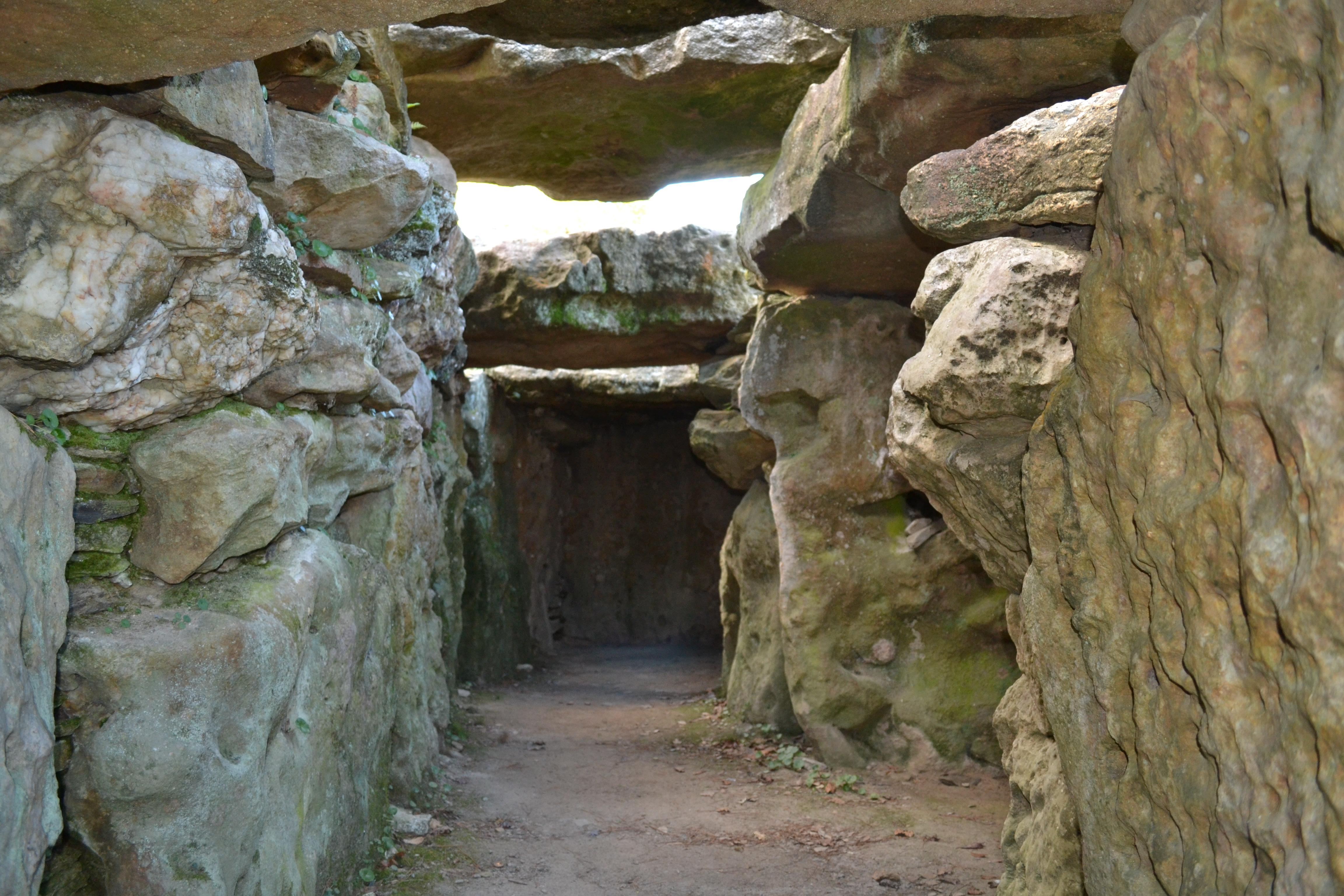 Couloir de la tombe B, Tumulus des Mousseaux, Pornic